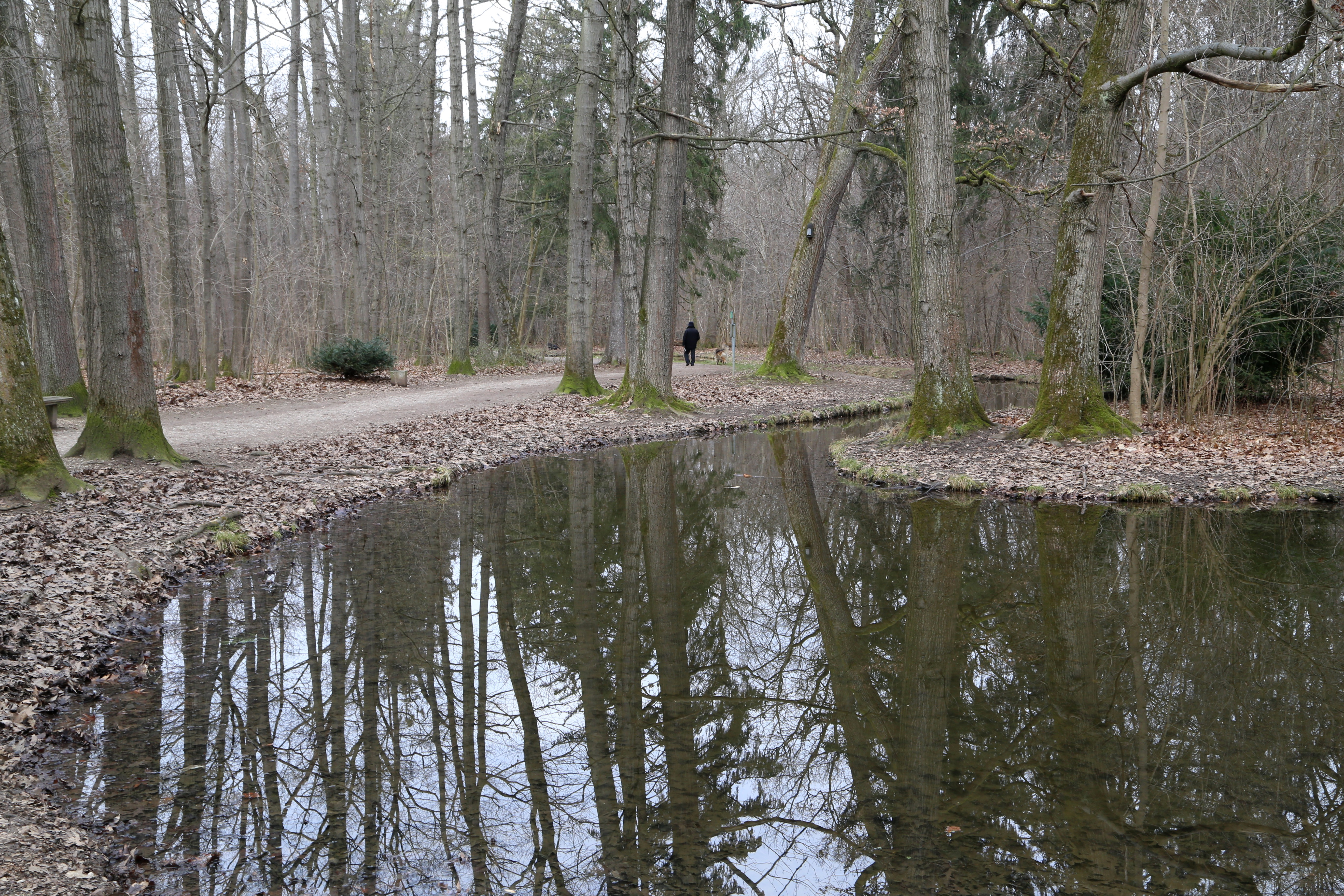 Hartmannshofer Bach im Hartmannshofer Park, München; LSG-00120.07